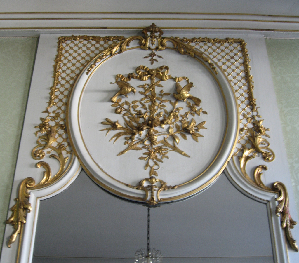 Hôtel de Blangy à Caen : panneau décoré d'un des salons